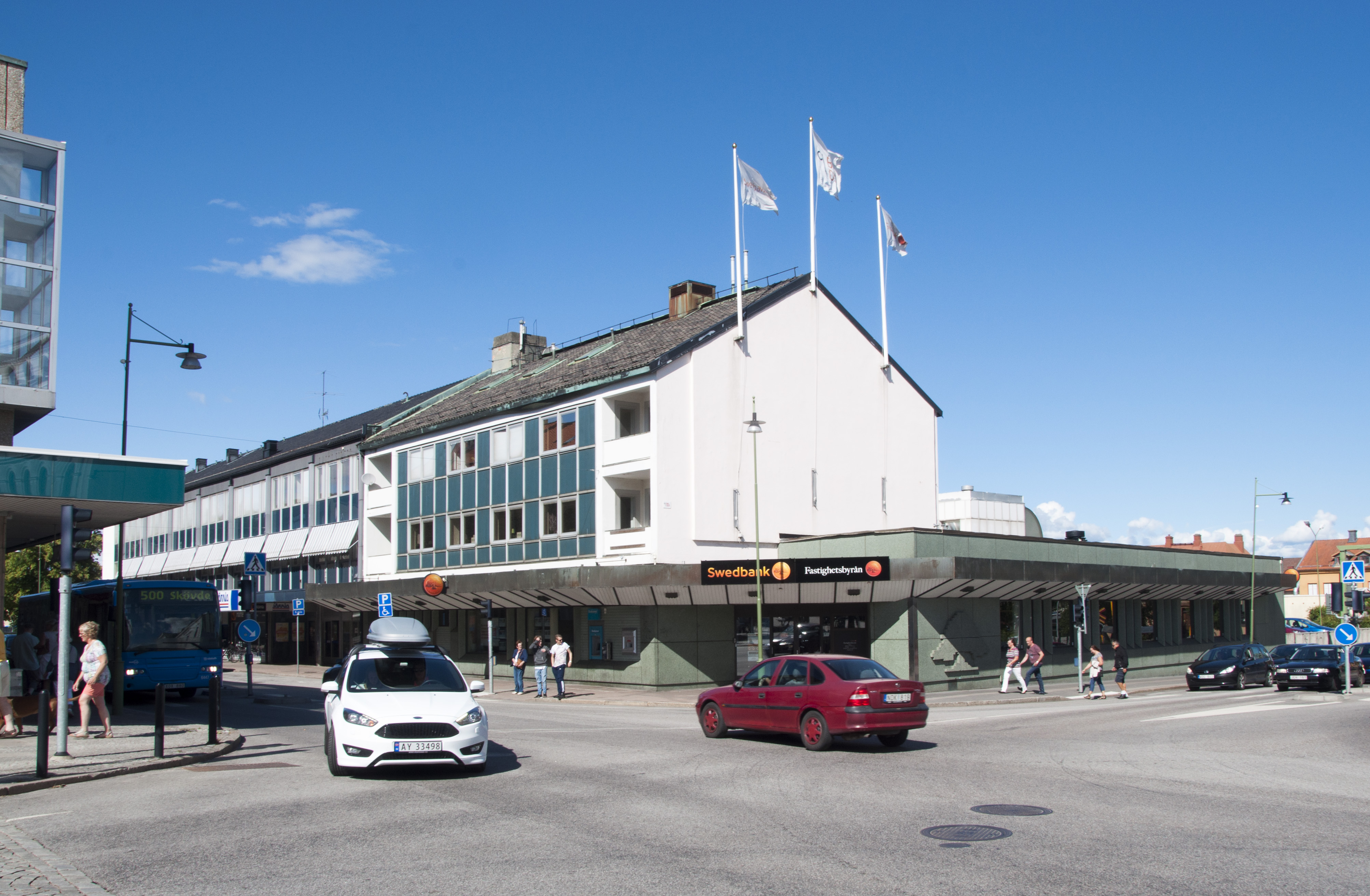 EPA—huset och Mariestads Sparbank, Nygatan 14 (kvarteret Staren 6) Byggnadsår 1958, arkitekt Bent Jörgen Jörgensen och sparfrämjandets arkitektkontor för AB Turitz och sparbanken. Bottenvåning senare förändrad